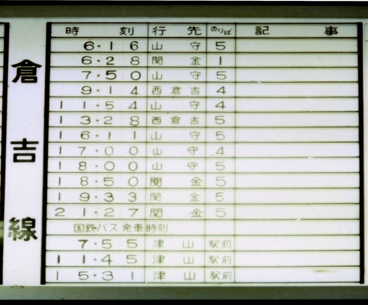 倉吉線・美伯線の時刻表 倉吉駅 Ｓ５６頃